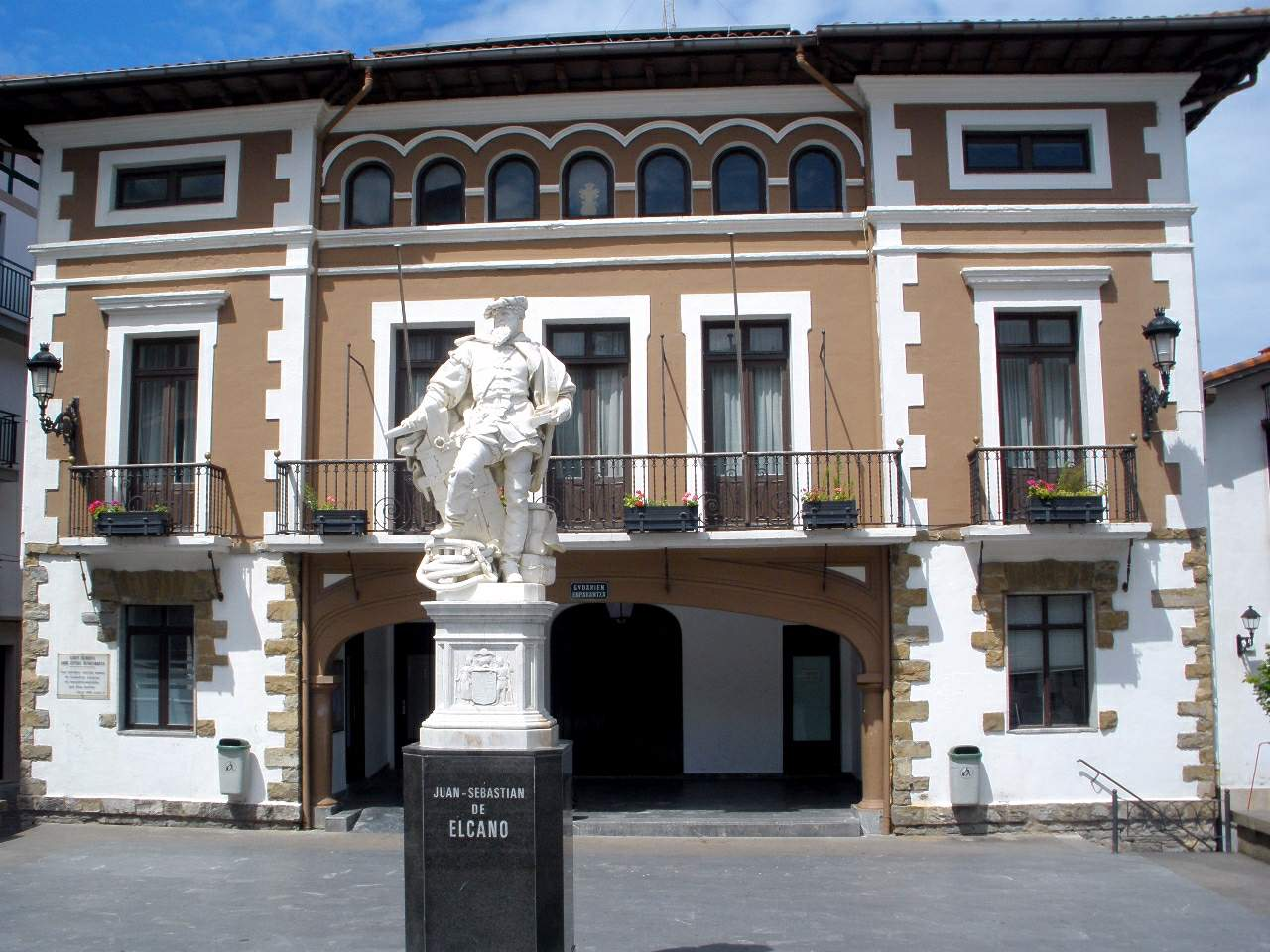 Ayuntamiento de Getaria